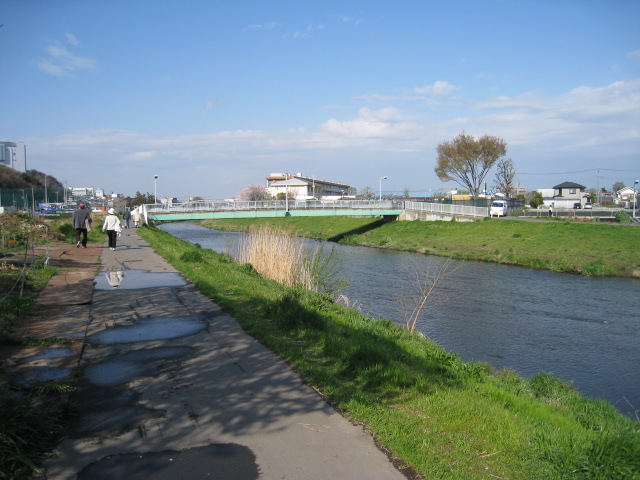 Mizonuma-kuromebashi, Kuromegawa, Asaka Saitama Japan